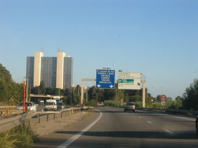 bretelle Sortie 51 A8